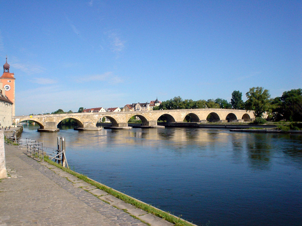 from de-wiki: Die Steinerne Brücke ist neben dem Regensburger Dom das bedeutendste Wahrzeichen der Stadt Regensburg und gilt als ein Meisterwerk mittelalterlicher Baukunst. Bildautor: Marc Reymann